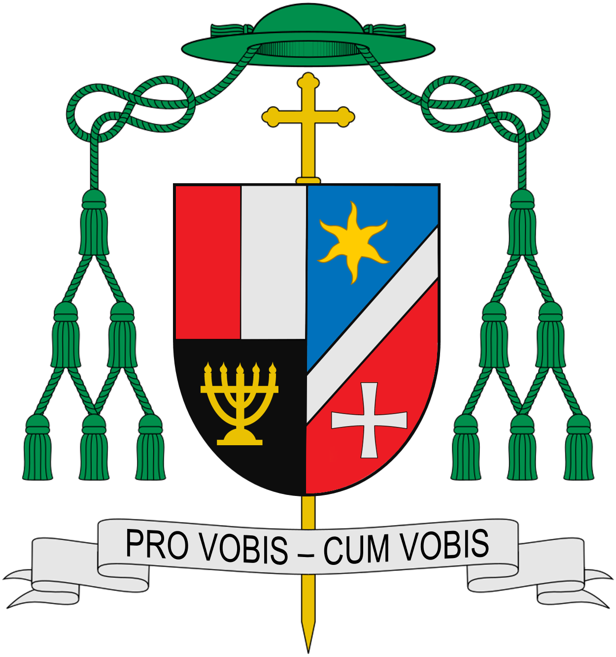 Bischofswappen mit zwölf Quasten. Auf der linken Wappenseite ist das Wappen der Diözese Augsburg und darunter ein aus der jüdischen Tradierung bezeugter, fünfarmiger Davidsleuchter. Die rechte Wappenseite ist aus der Tradition der Erzabtei St. Ottilien inspiriert.